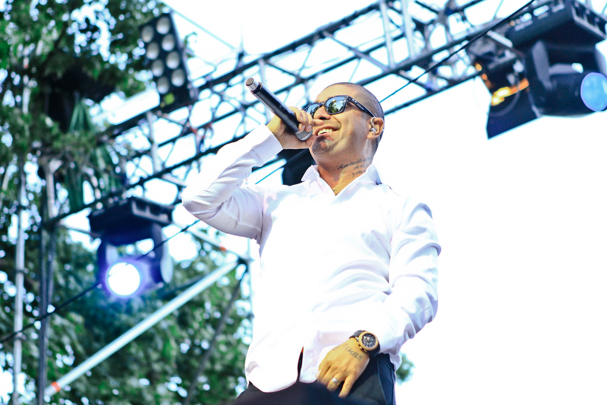 DJ Méndez, cierre de campaña de Michelle Bachelet.